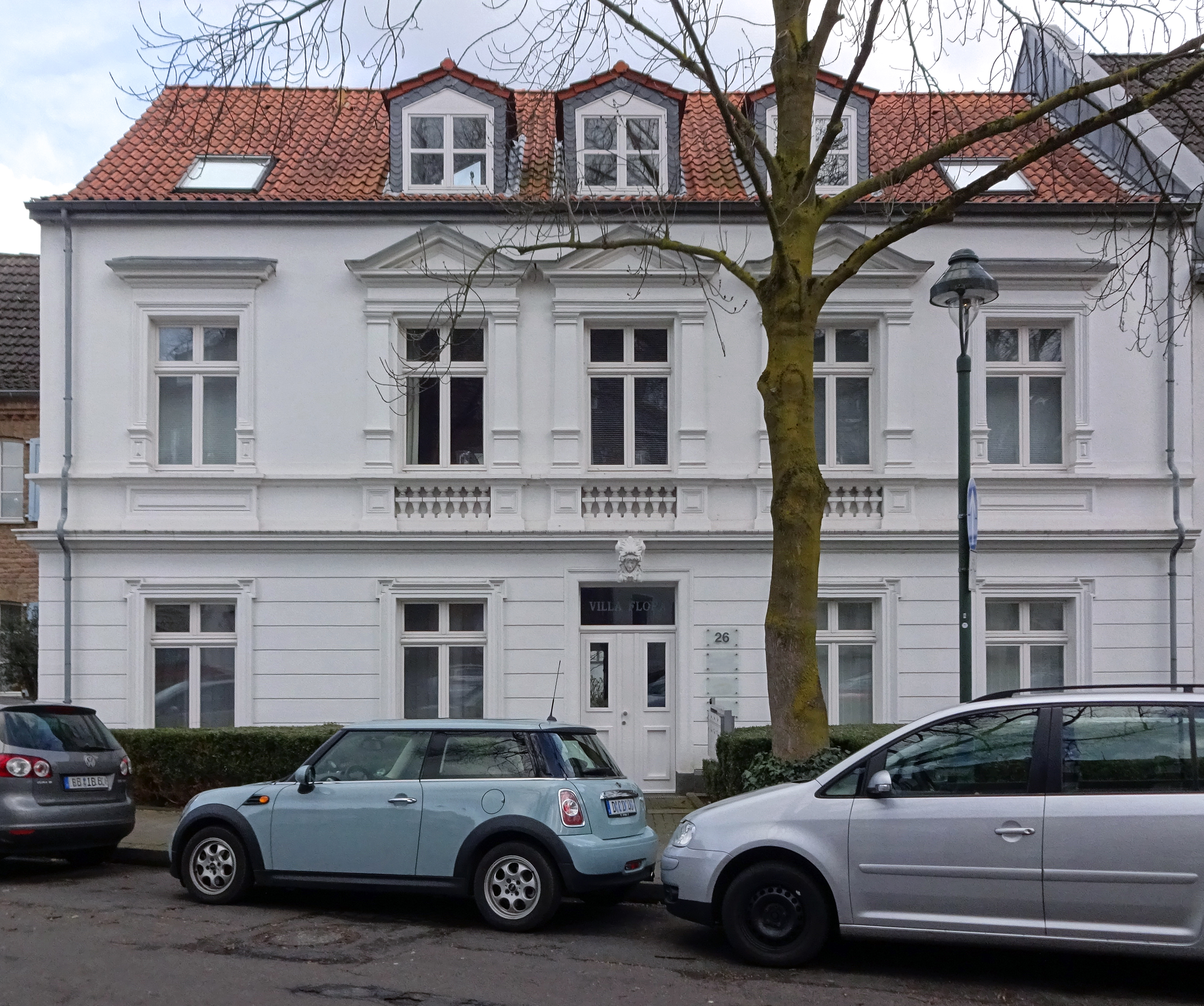 Haus Villa Flora Oberkasseler Straße 26, Elternhaus Theo Champion, Düsseldorf-Oberkassel